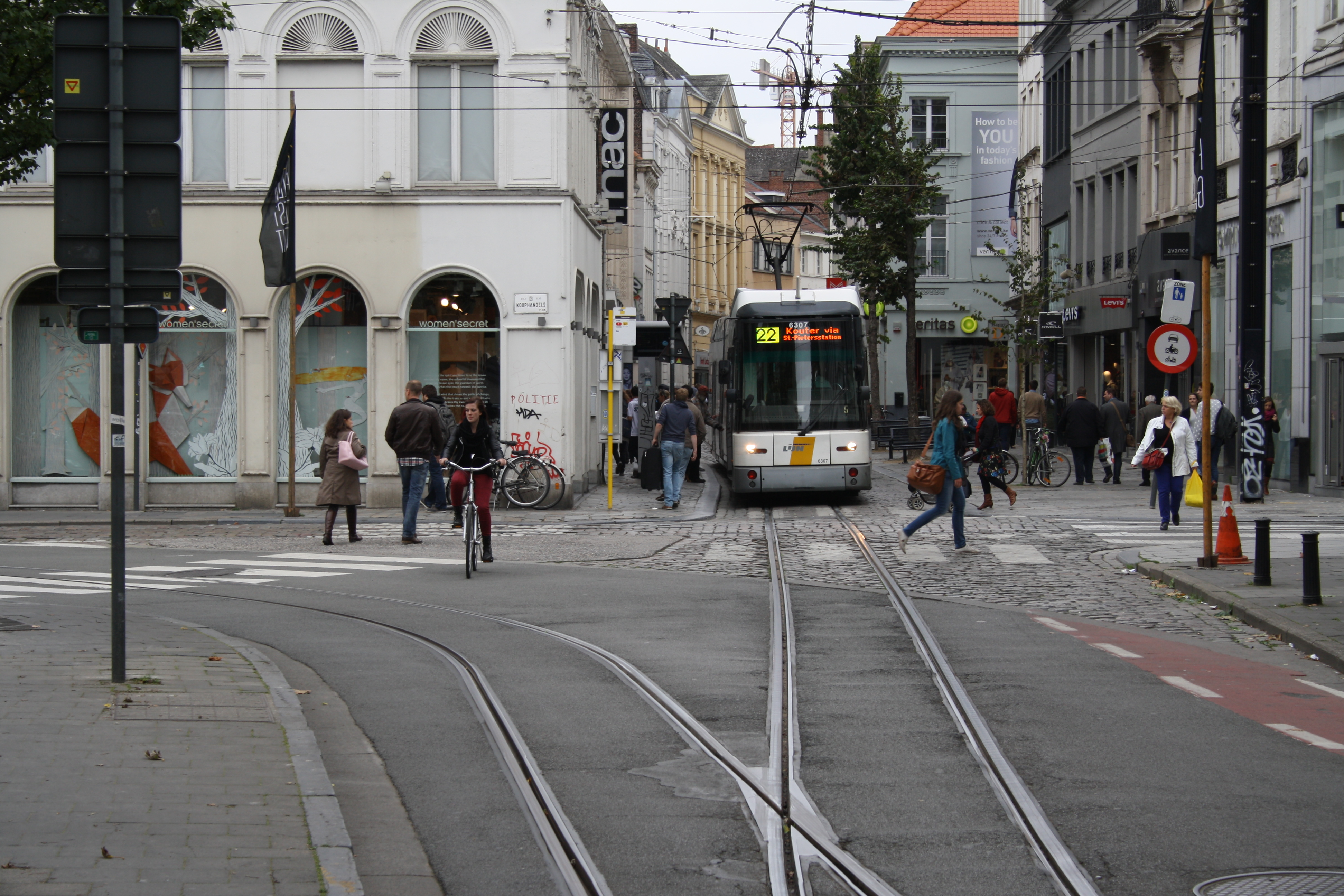 Niederflurtram in Gent